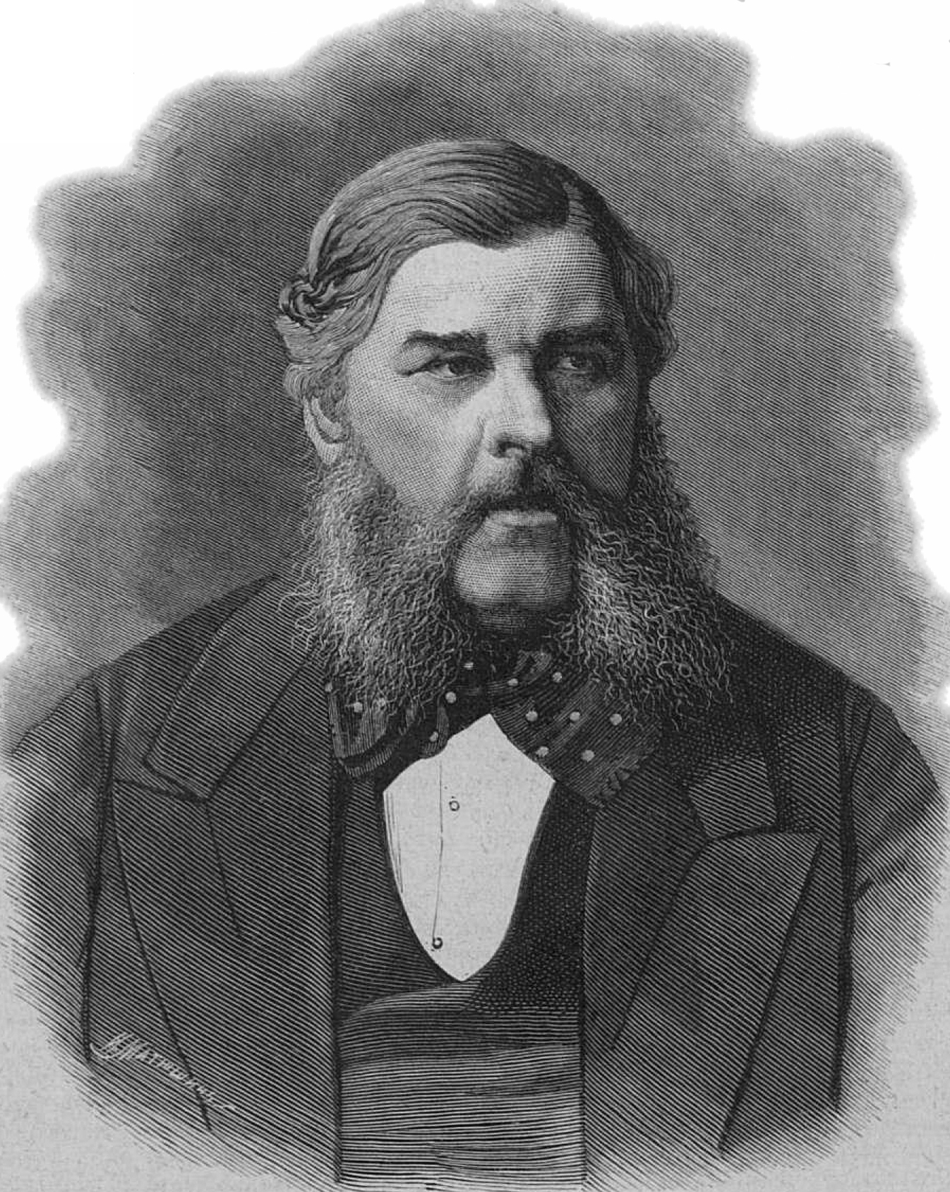 Соллогуб Владимир Александрович, 1870-е годы